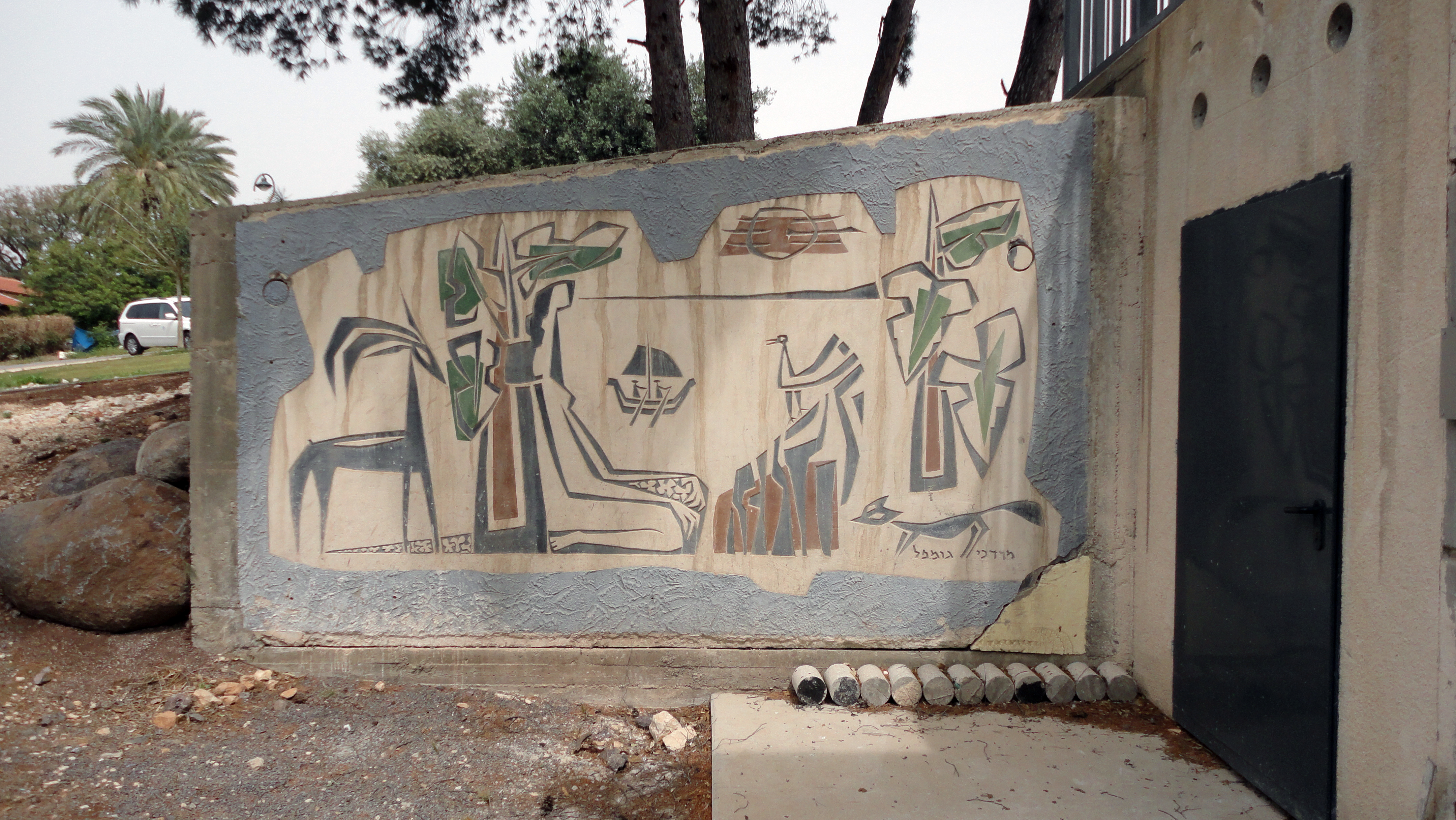 Painting